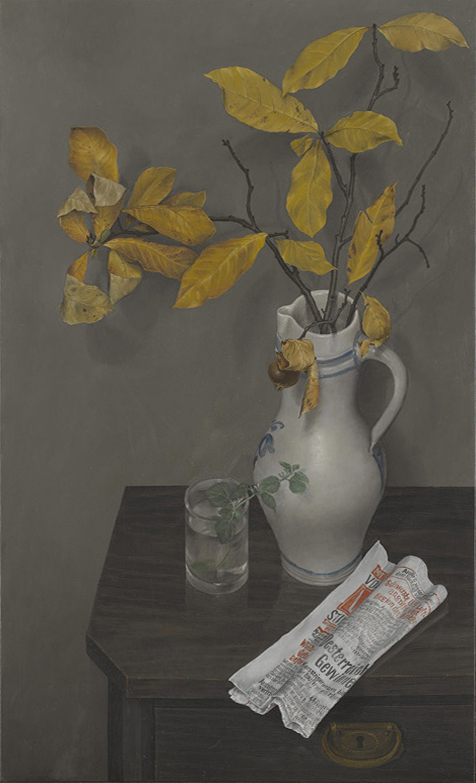 Hubert Dietrich: Stillleben mit Krug und Zeitung, Öl auf Holz, 68,5x41cm, 1972, Privatbesitz.